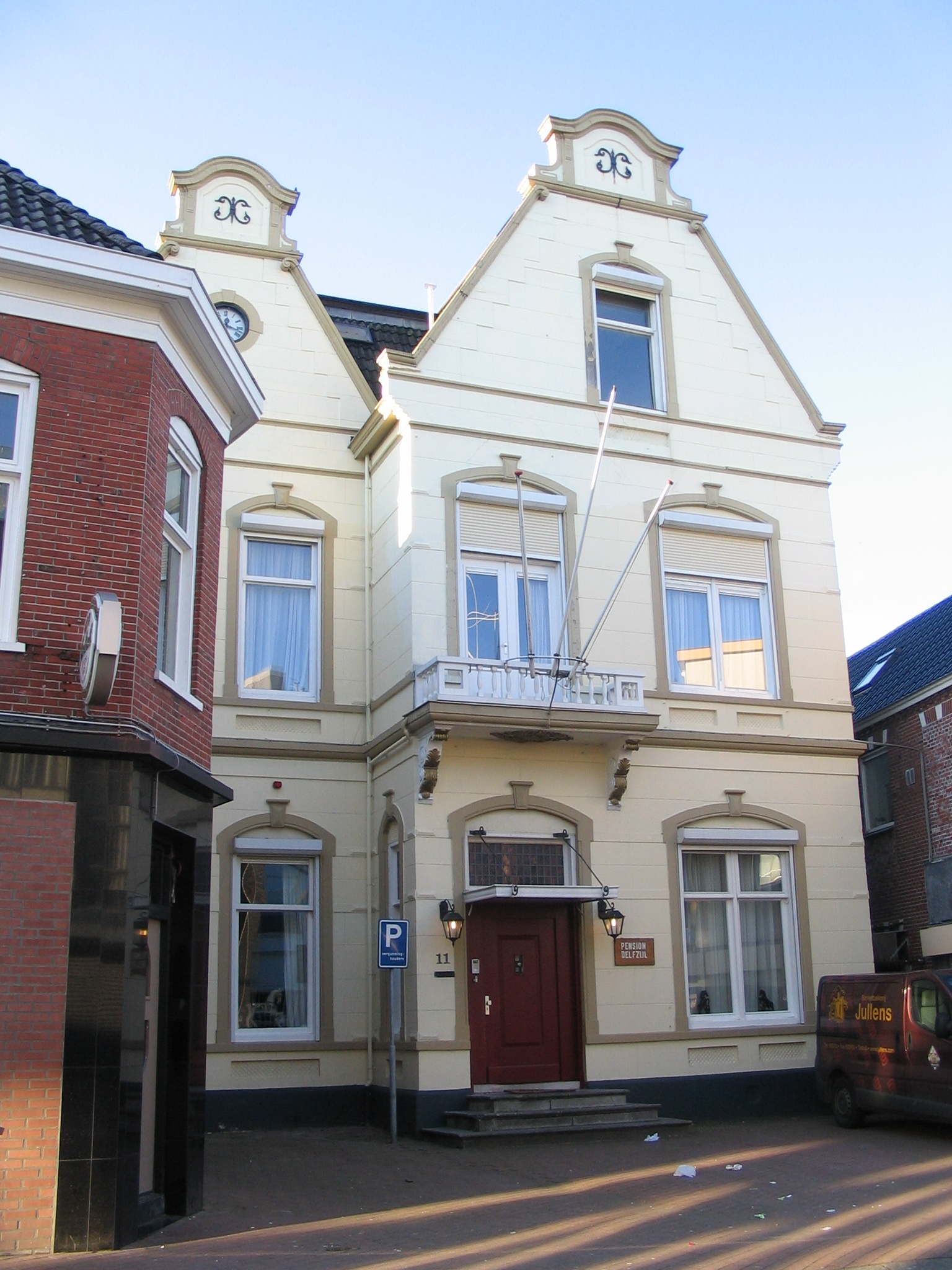 Het boormalig Gemeentehuis van Delfzijl aan de Oude schans